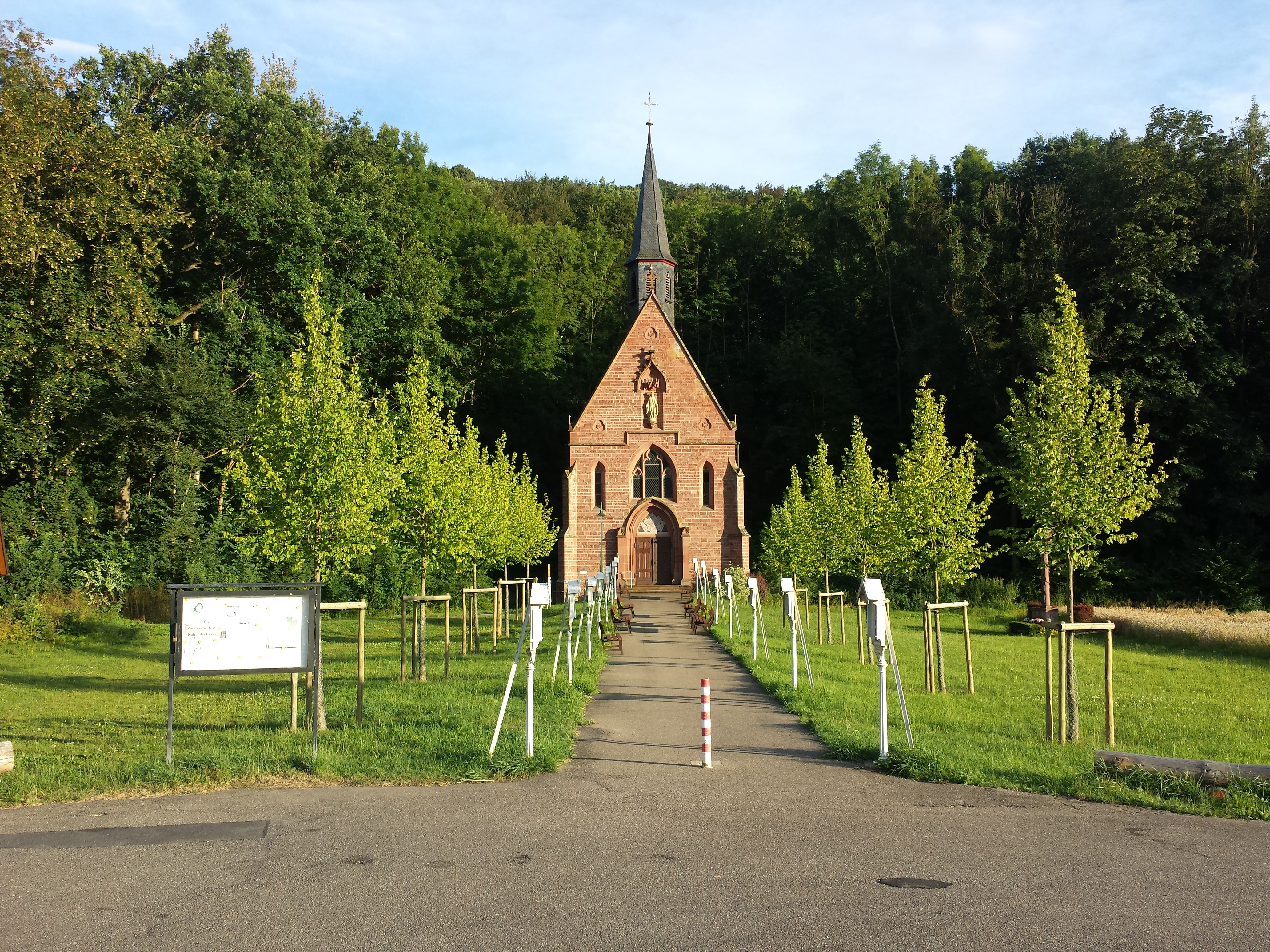 Die Wallfahrtskapelle Liebfrauenbrunn liegt etwa 2 km außerhalb Werbachs im Welzbachtal in Richtung Werbachhausen am Welzbachtalradweg. Im 15. Jahrhundert wurde die Kapelle der Muttergottes geweiht. Das Wasser der Quelle, die sich unter der Kapelle befindet, wird von Gläubigen mit Vertrauen auf die Fürsprache der Muttergottes in Krankheiten, besonders bei Augenleiden gebraucht.